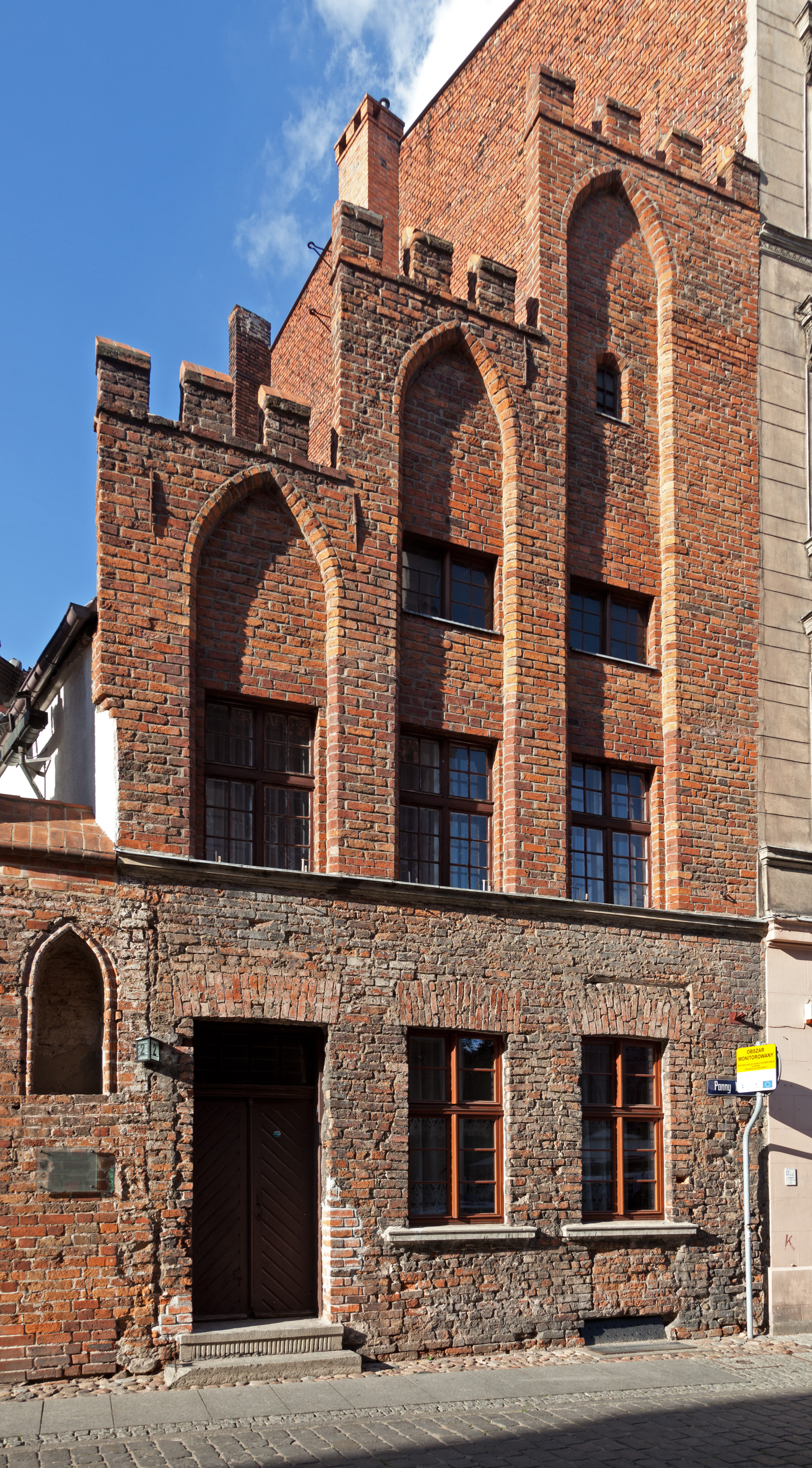 Toruń, ul. Panny Marii 2 - dom furtiana klasztoru franciszkanów z XIV w. (zabytek nr A/521)